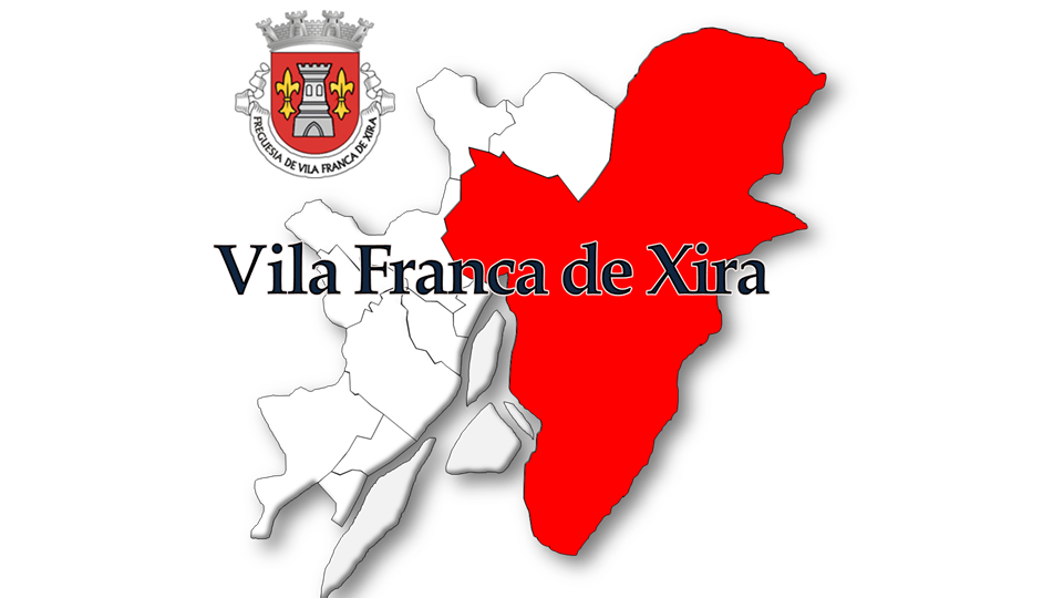 Evolução da População